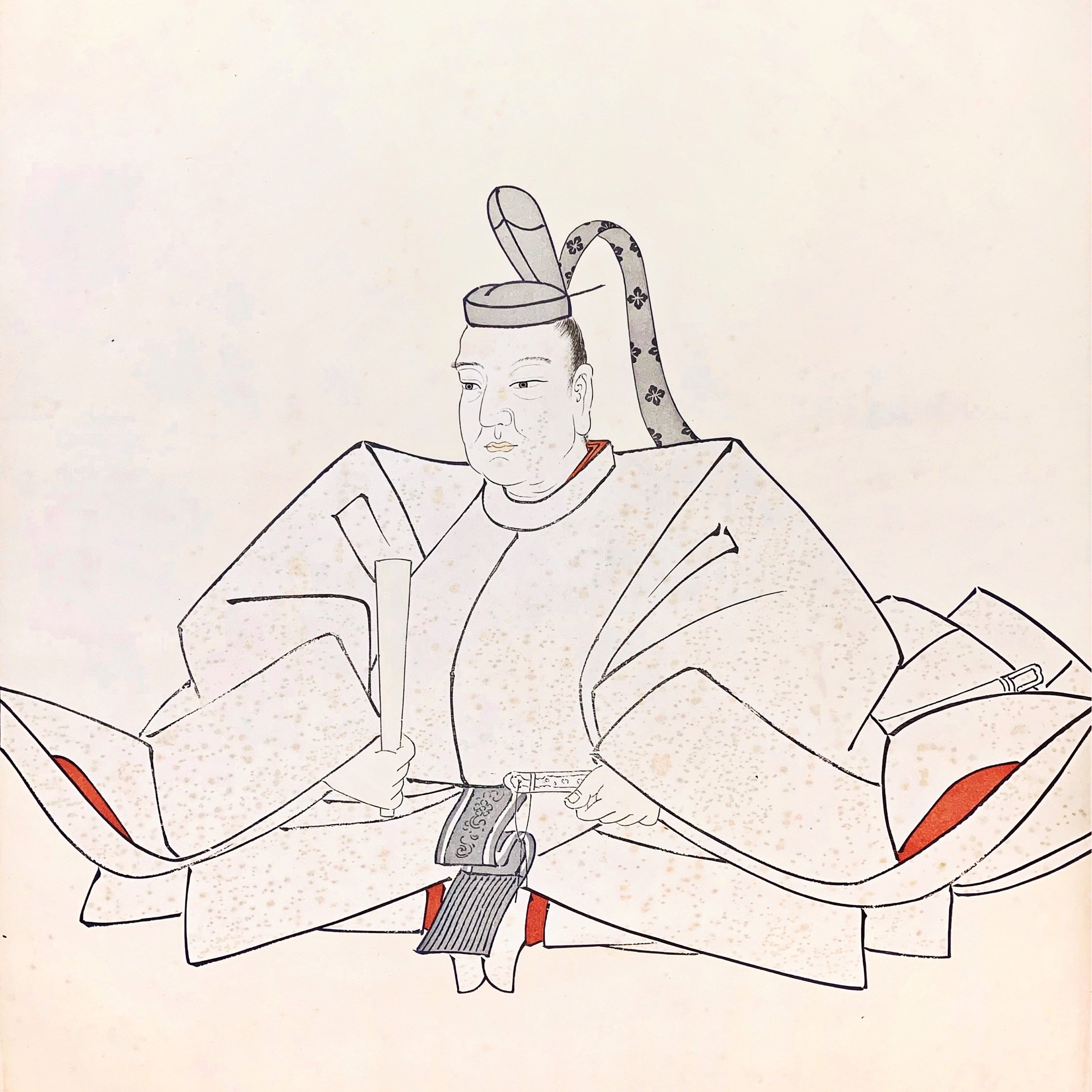 徳川家光の肖像。